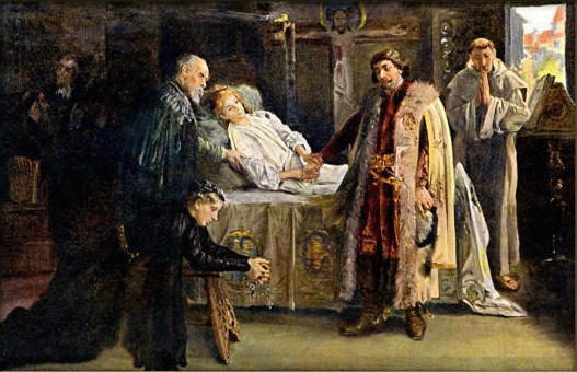 Ladislav Pohrobek na smrtelném loži děkuje zemskému správci Jiřímu Poděbradskému